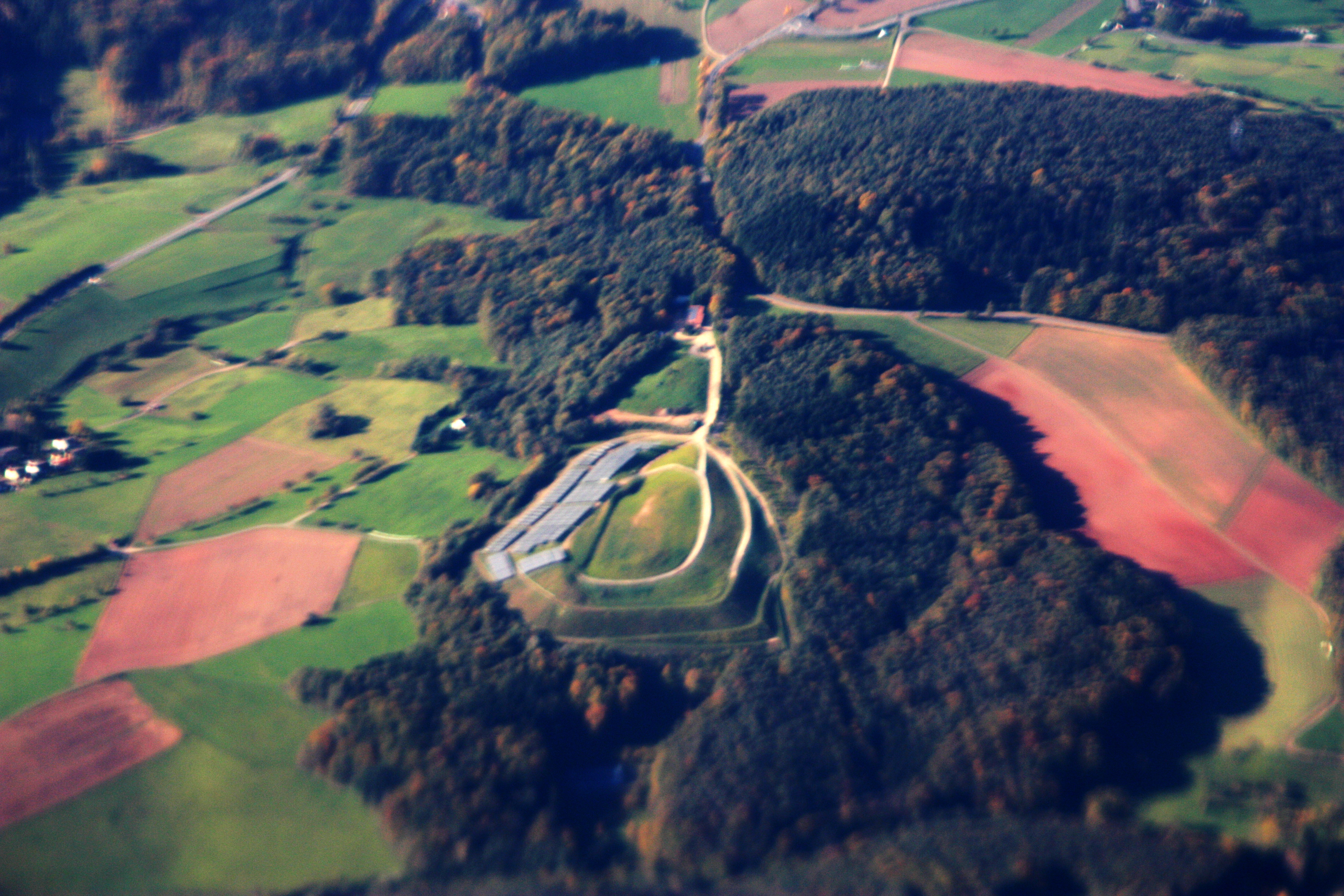 1 Flug von Frankfurt/Main nach Sofia; Start 10:12 MEZ; Landung 13:06 MEZ; Oktober 2010 ; zwischen Hembach und Brombachtal